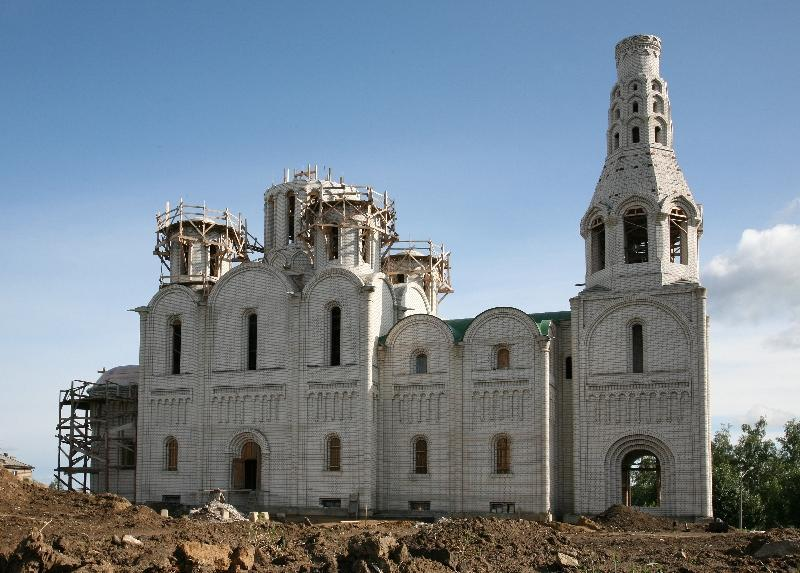 Эрзянь: Барнаул